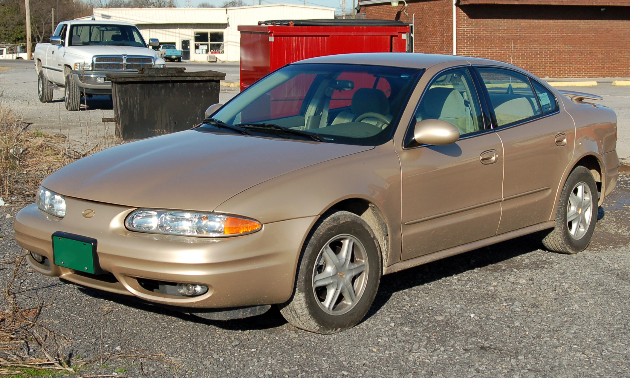 2002 Oldsmobile Alero sedan